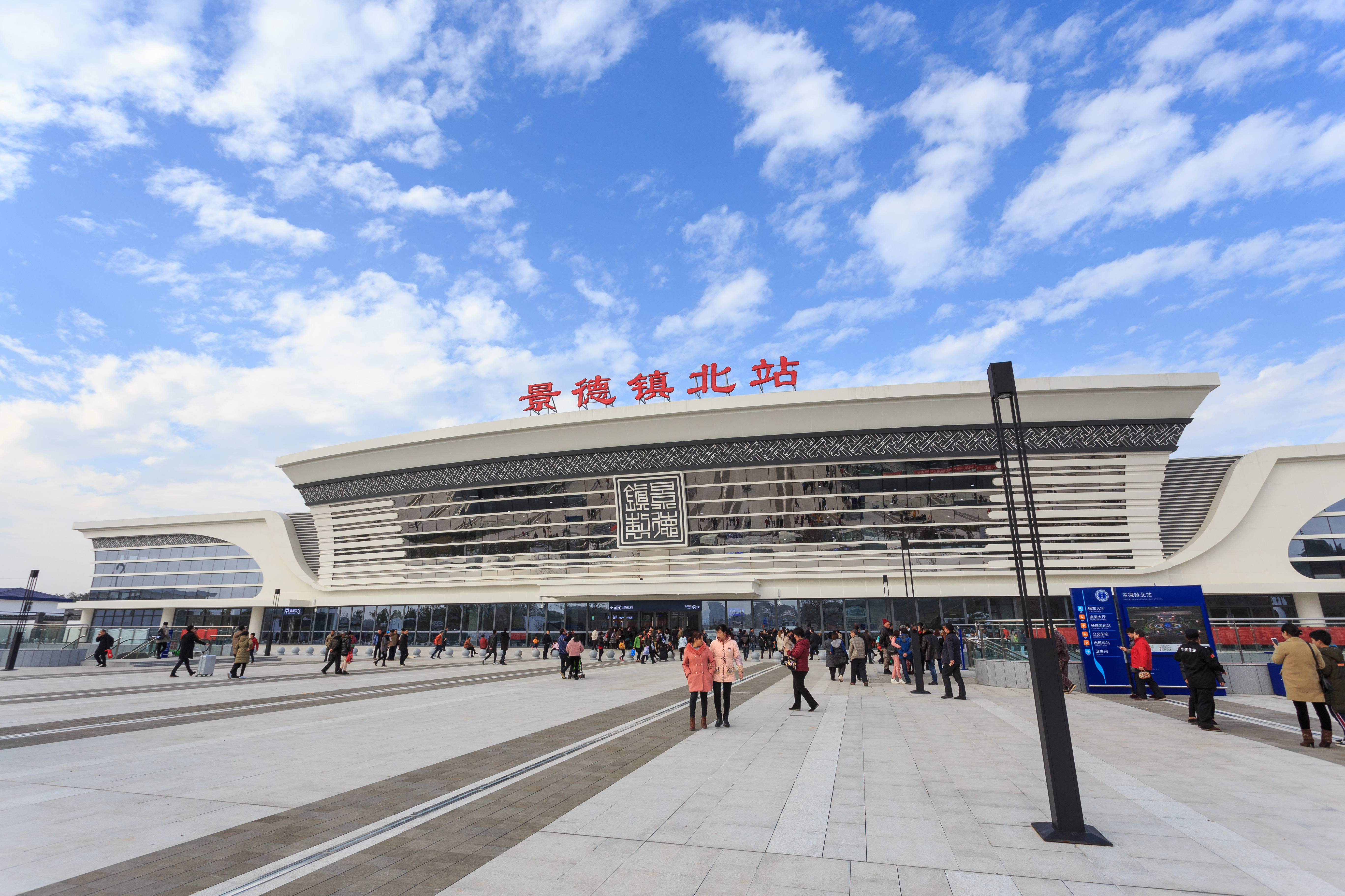 景德镇北站